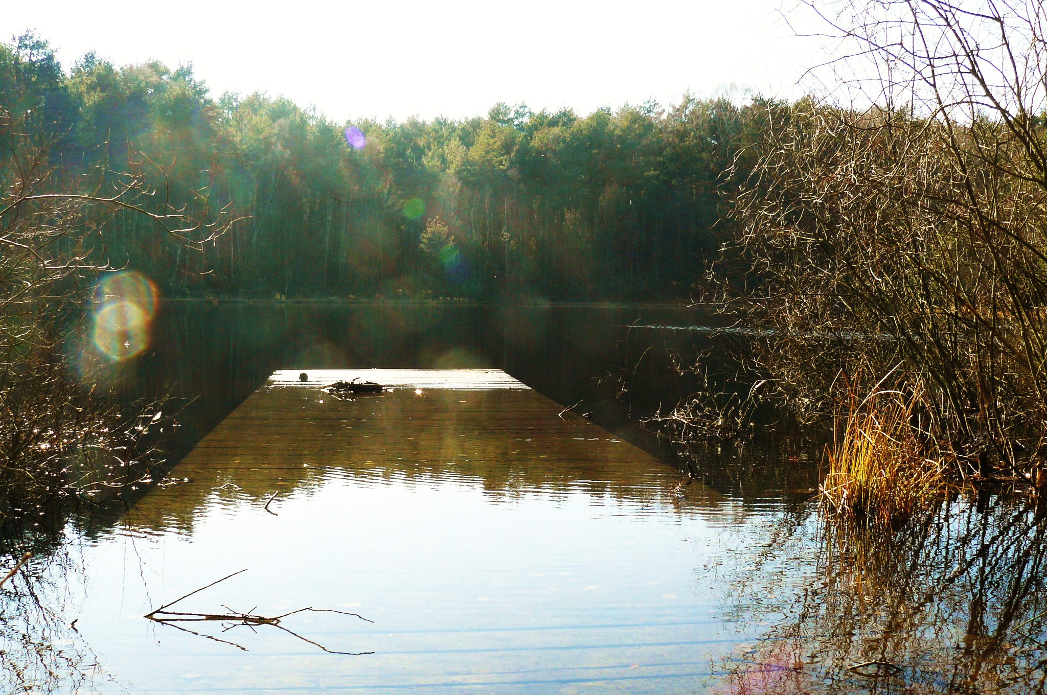 Jezioro Ósemka (Pustelnik) koło Rzecina w Puszczy Noteckiej.